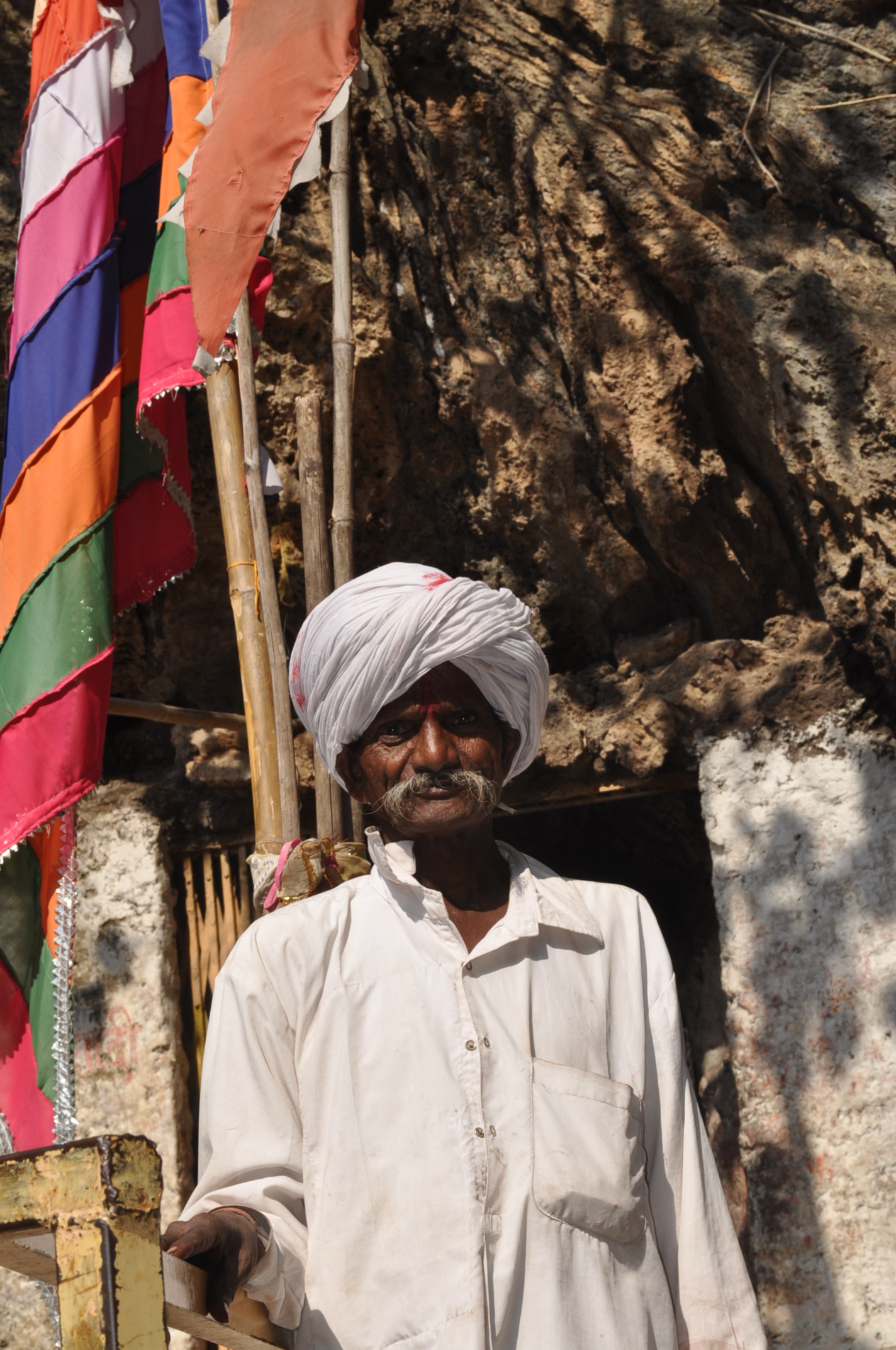 सीतामाता मंदिर के सामने एक मीणा आदिवासी